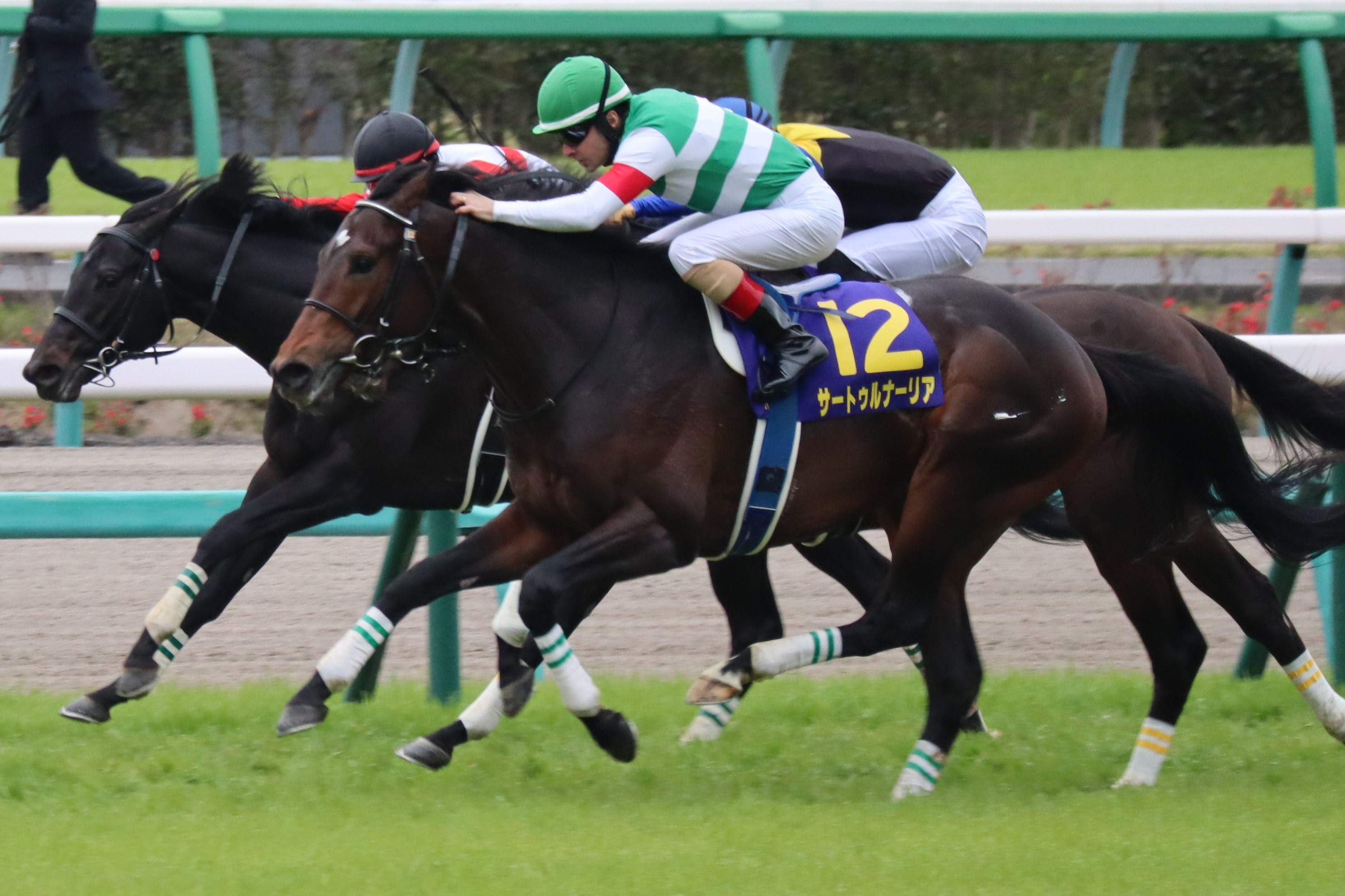 第79回皐月賞出走時(2019年4月14日)